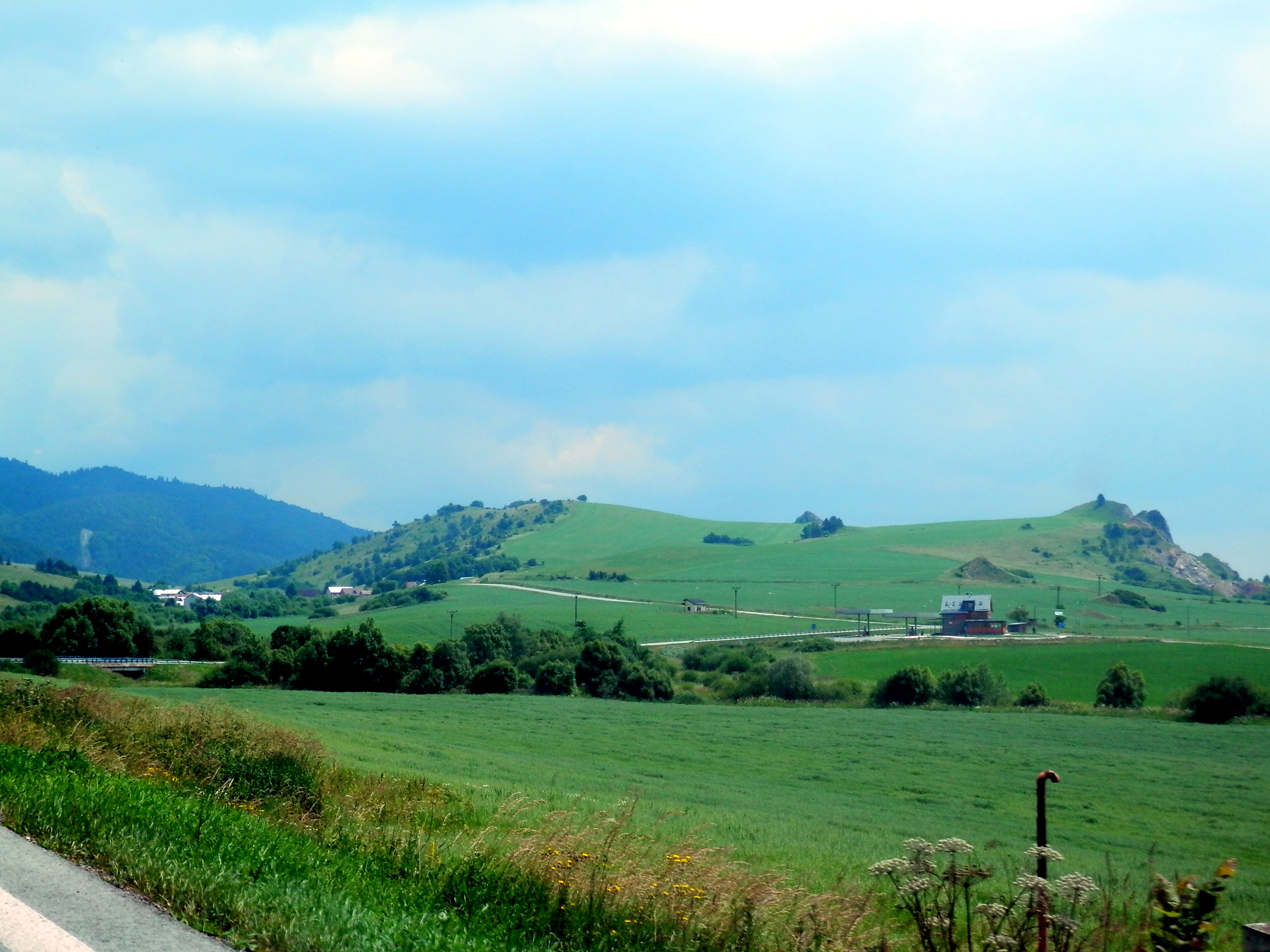 Okolitá príroda pri obci Pusté Pole. Okres Stará Ľubovňa